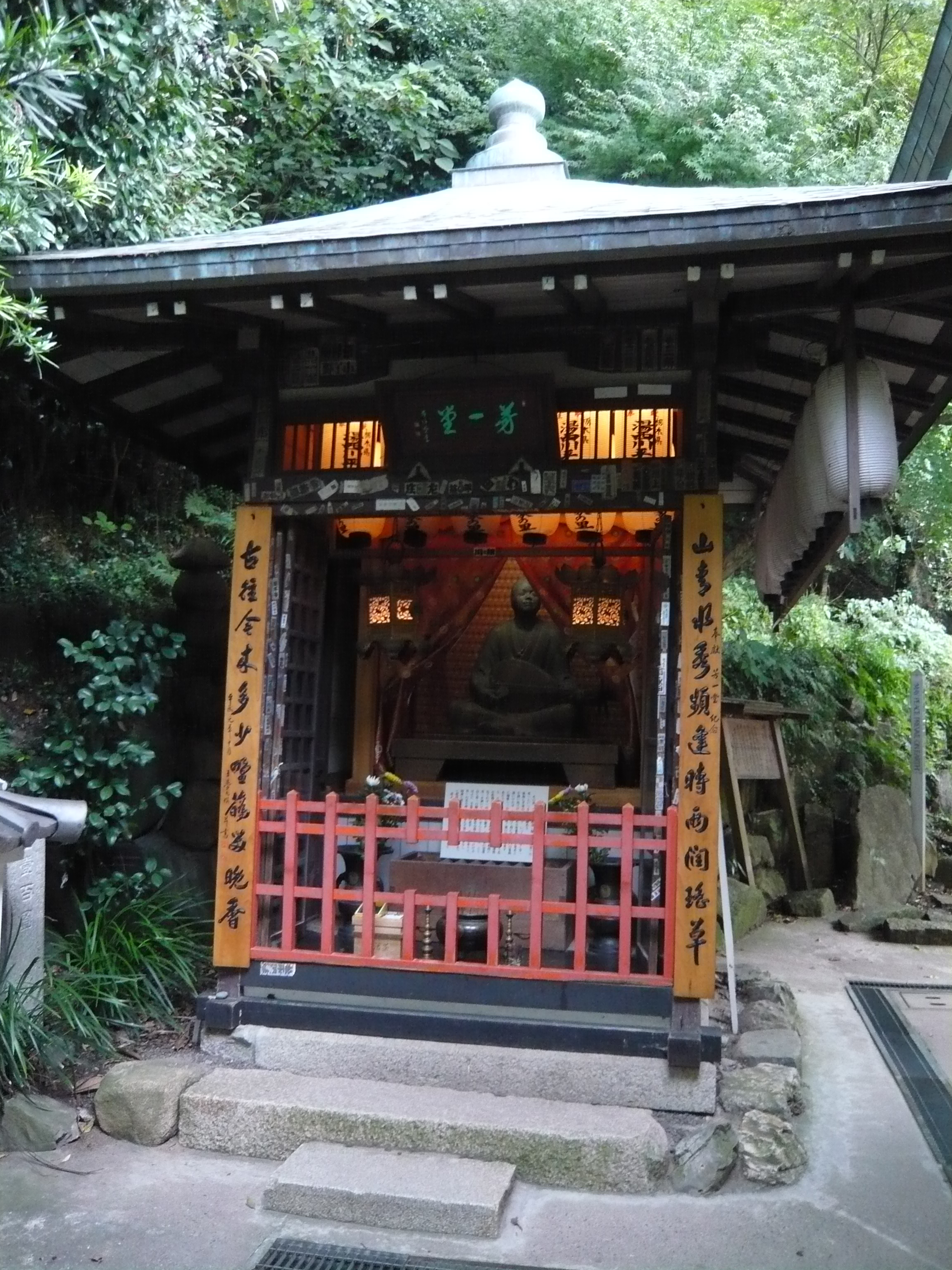 the Hōichi-dō (Miminashi-Hōichi's shrine) in Akama-jingū, Shimonoseki, Yamaguchi, Japan 赤間神宮（山口県下関市）芳一堂